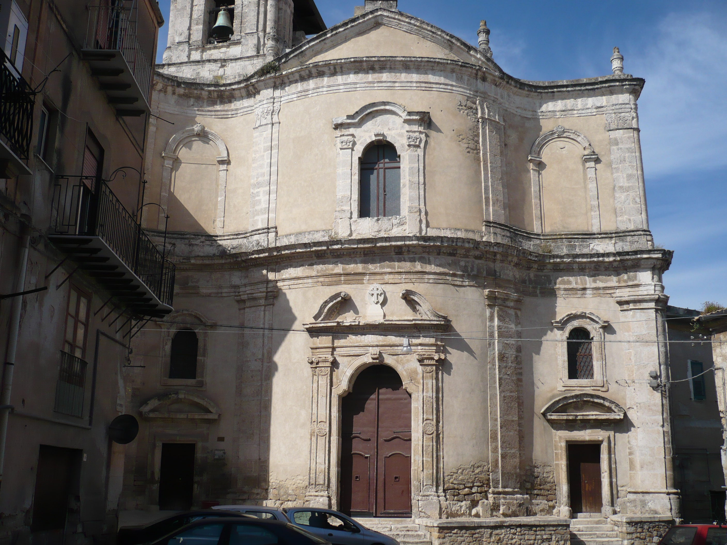 Facciata di San Domenico a Caltanissetta